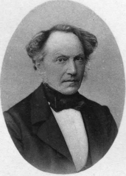 Porträtfotografie von Gustav Pfizer.